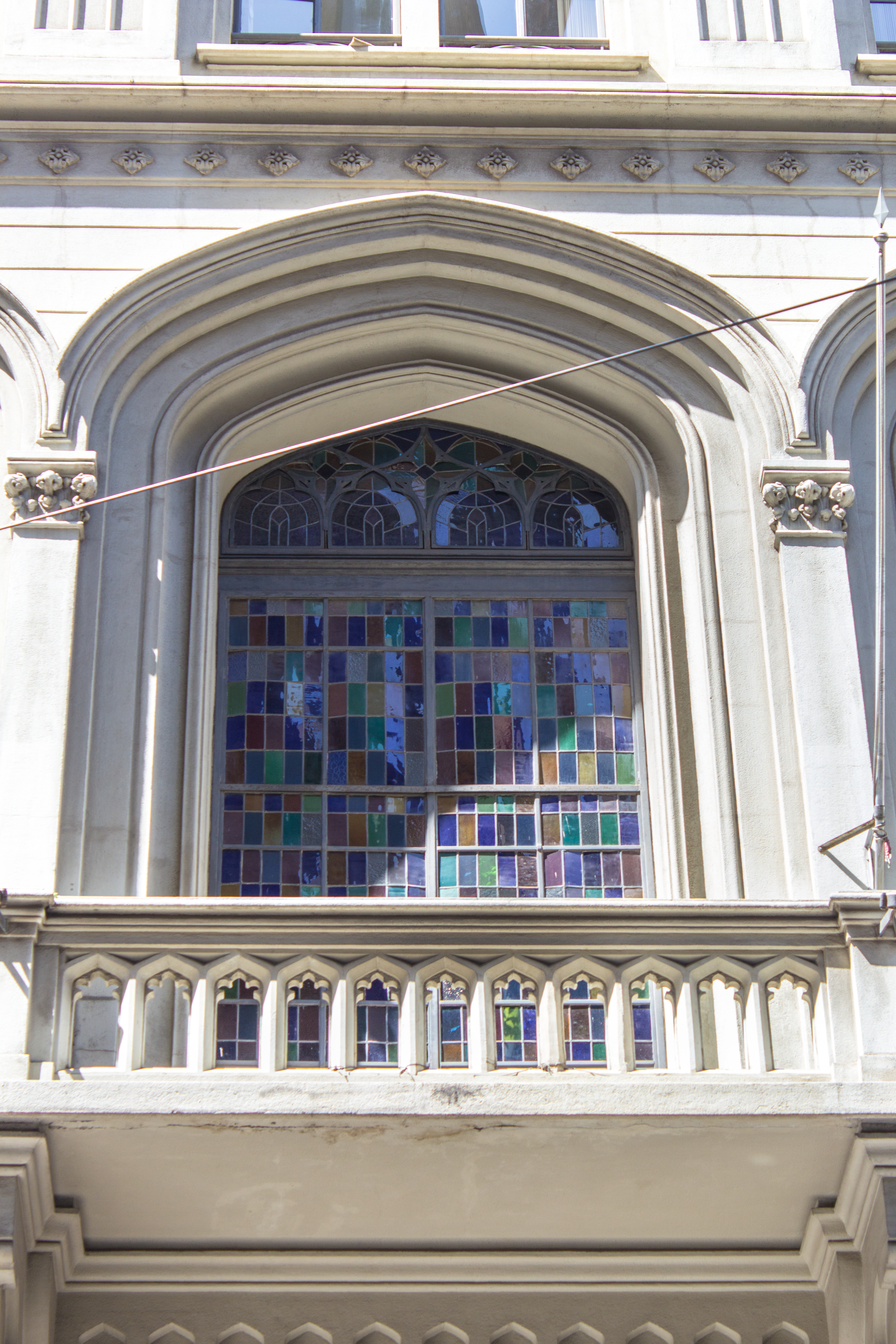 Fachada do Edifício do London & River Plate Bank, em São Paulo (SP), Brasil.